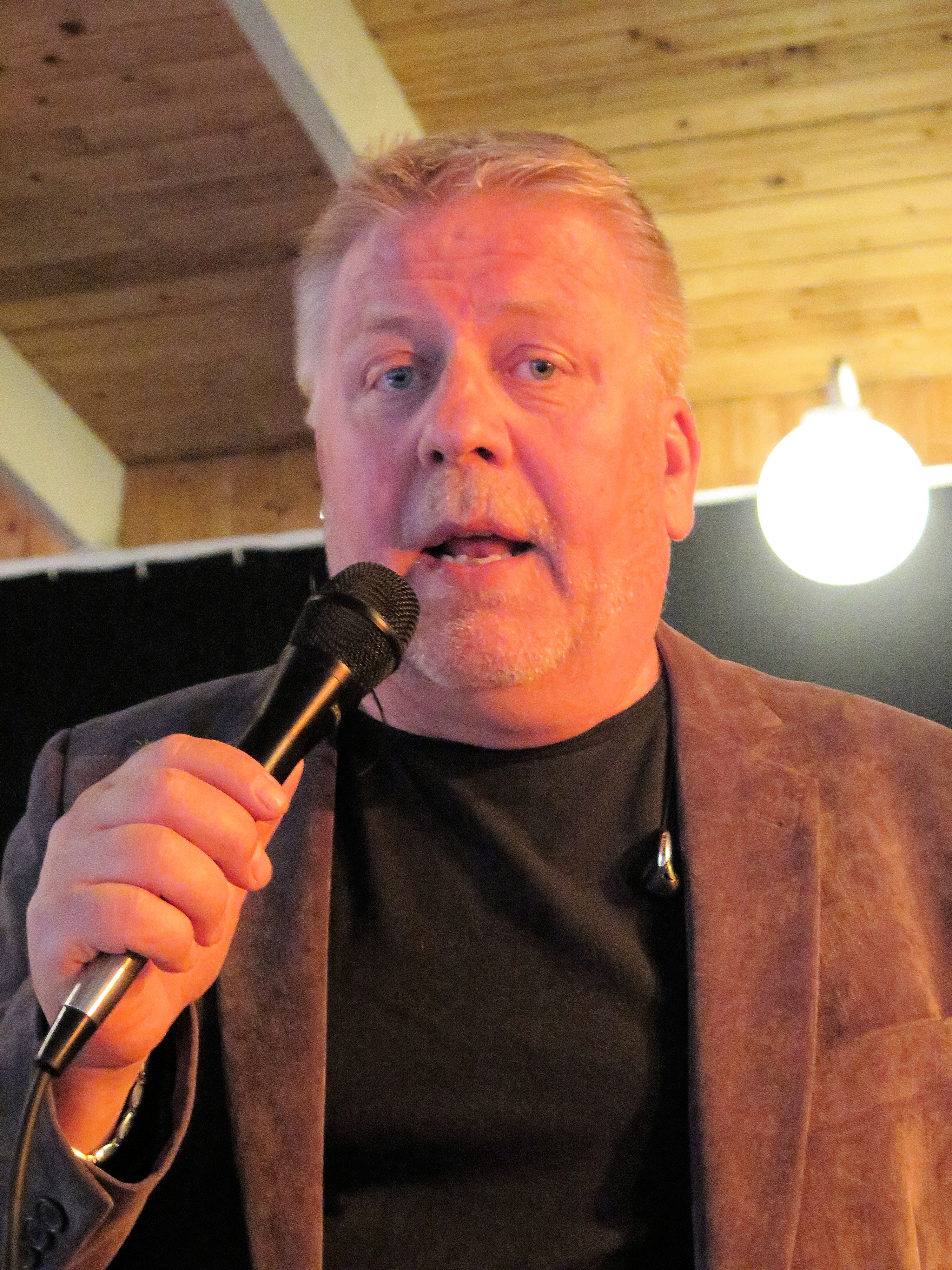 Arto Nuotio suomalainen laulaja